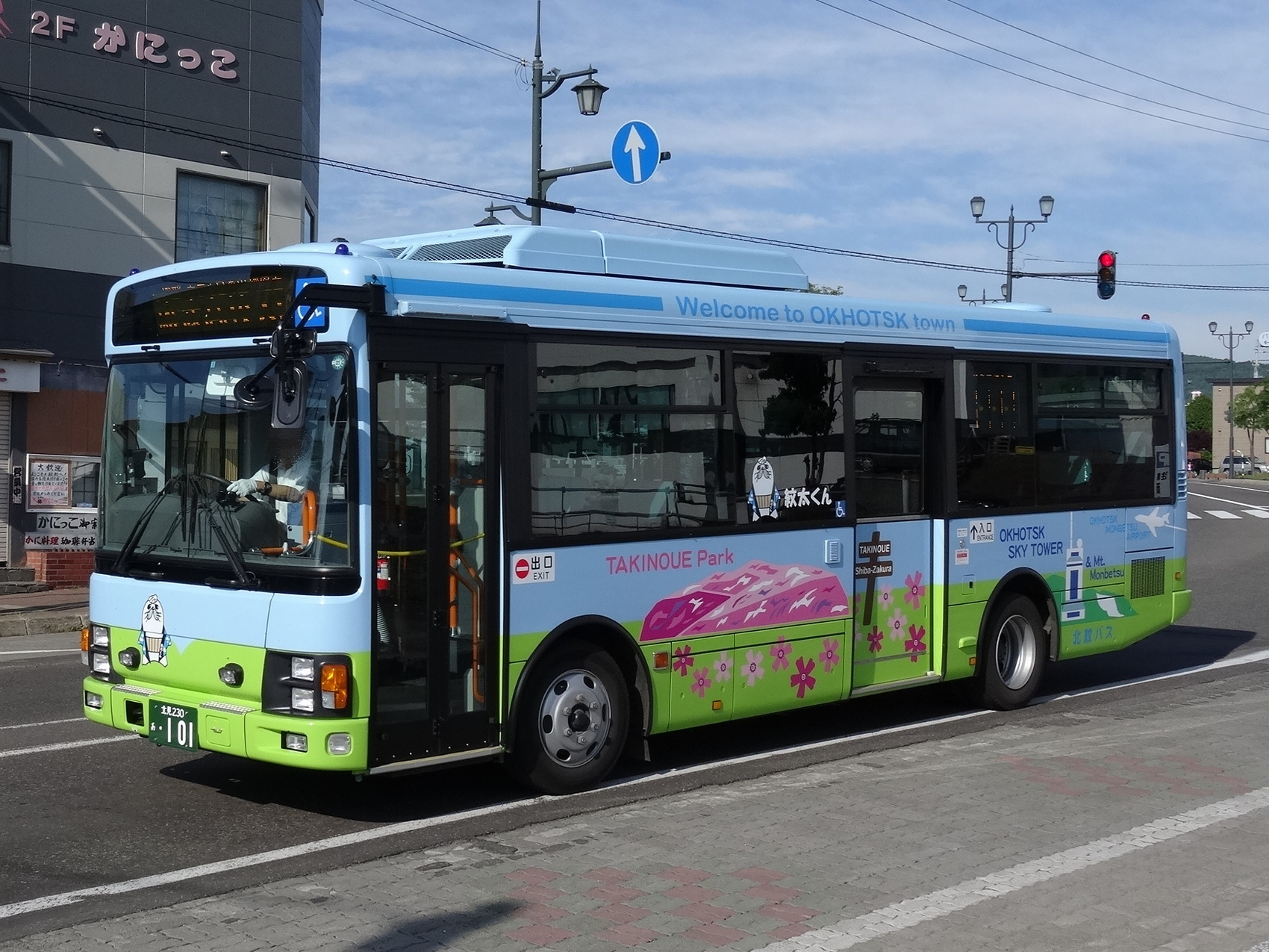 Monbetsu to Ōmu